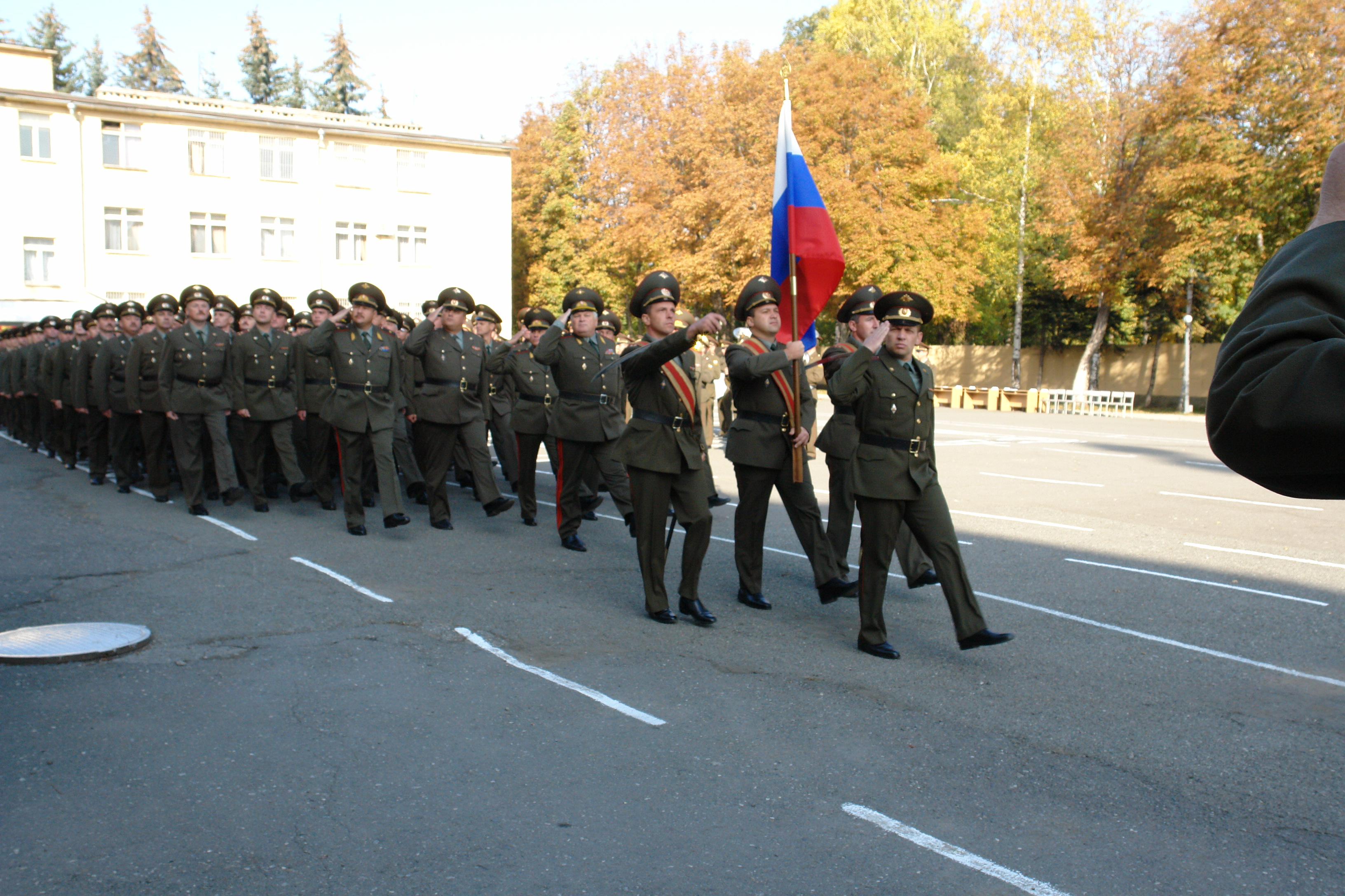 Управление 58 армии - прохождение торжественным маршем, Владикавказ, 2007 год